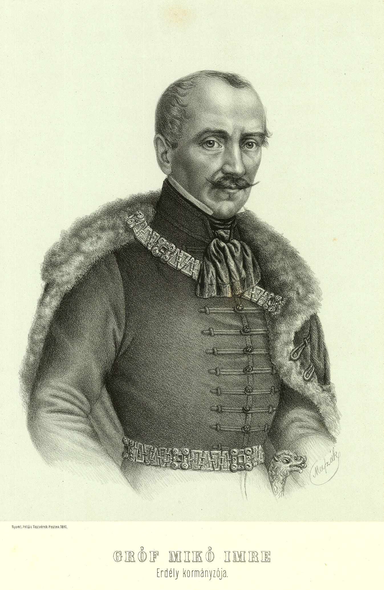 Gróf hídvégi Mikó Imre (Zabola, 1805. szeptember 4. – Kolozsvár, 1876. szeptember 16.) erdélyi magyar államférfi, művelődés- és gazdaságpolitikus, történész. A 19. századi Erdély politikai életének haladó szemléletű, meghatározó alakja, két ízben (1848, 1860–1861) Erdély főkormányzója, 1867 és 1870 között Magyarország közmunka- és közlekedésügyi minisztere volt. A közművelődés és közélet terén fáradhatatlanul munkálkodott hazája gazdasági, kulturális és tudományos felemelkedésén, kiérdemelve ezzel az „Erdély Széchenyije” megtisztelő jelzőt.